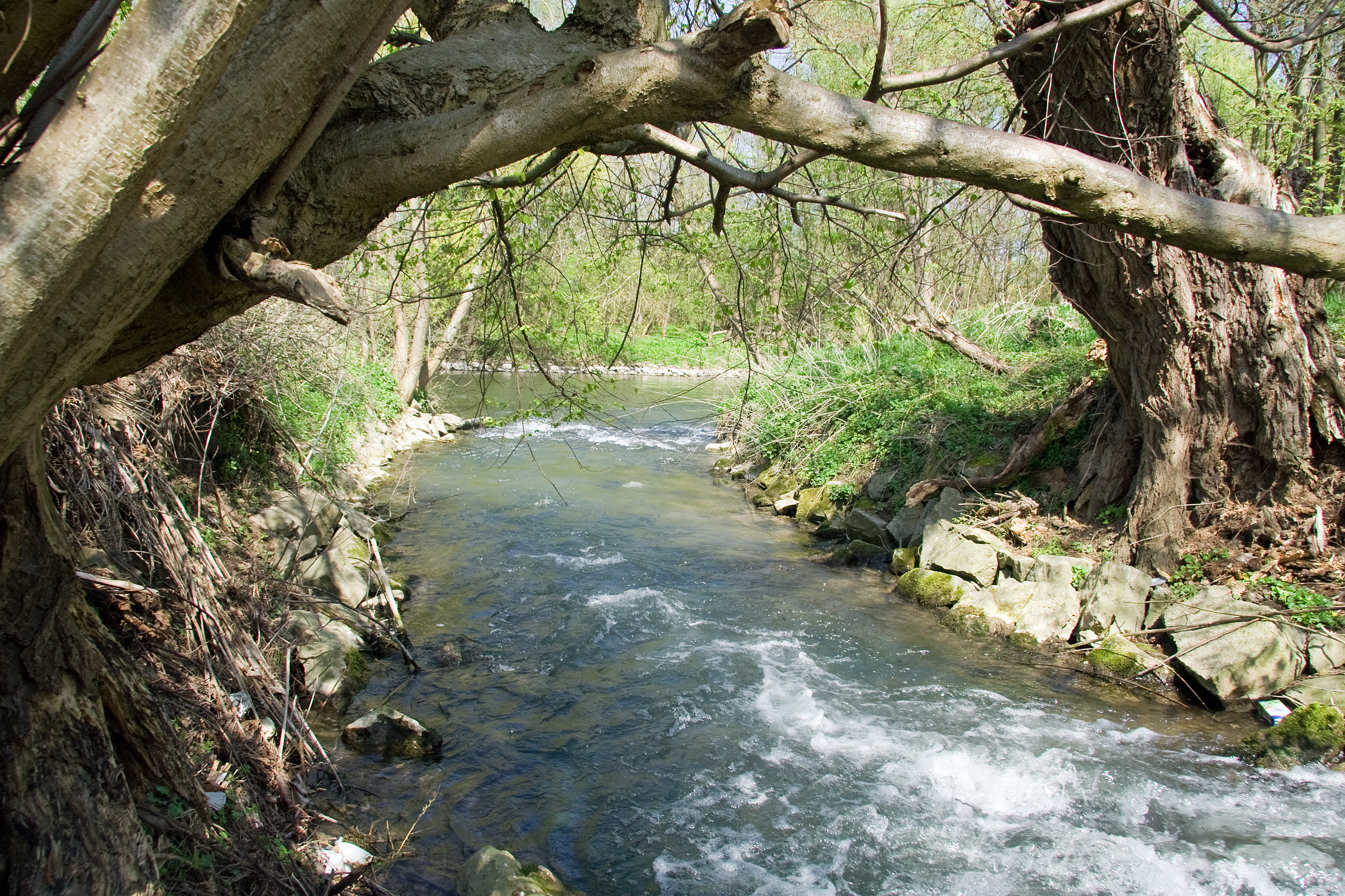 Der Strudelbach in Enzweihingen kurz vor der Mündung in die Enz